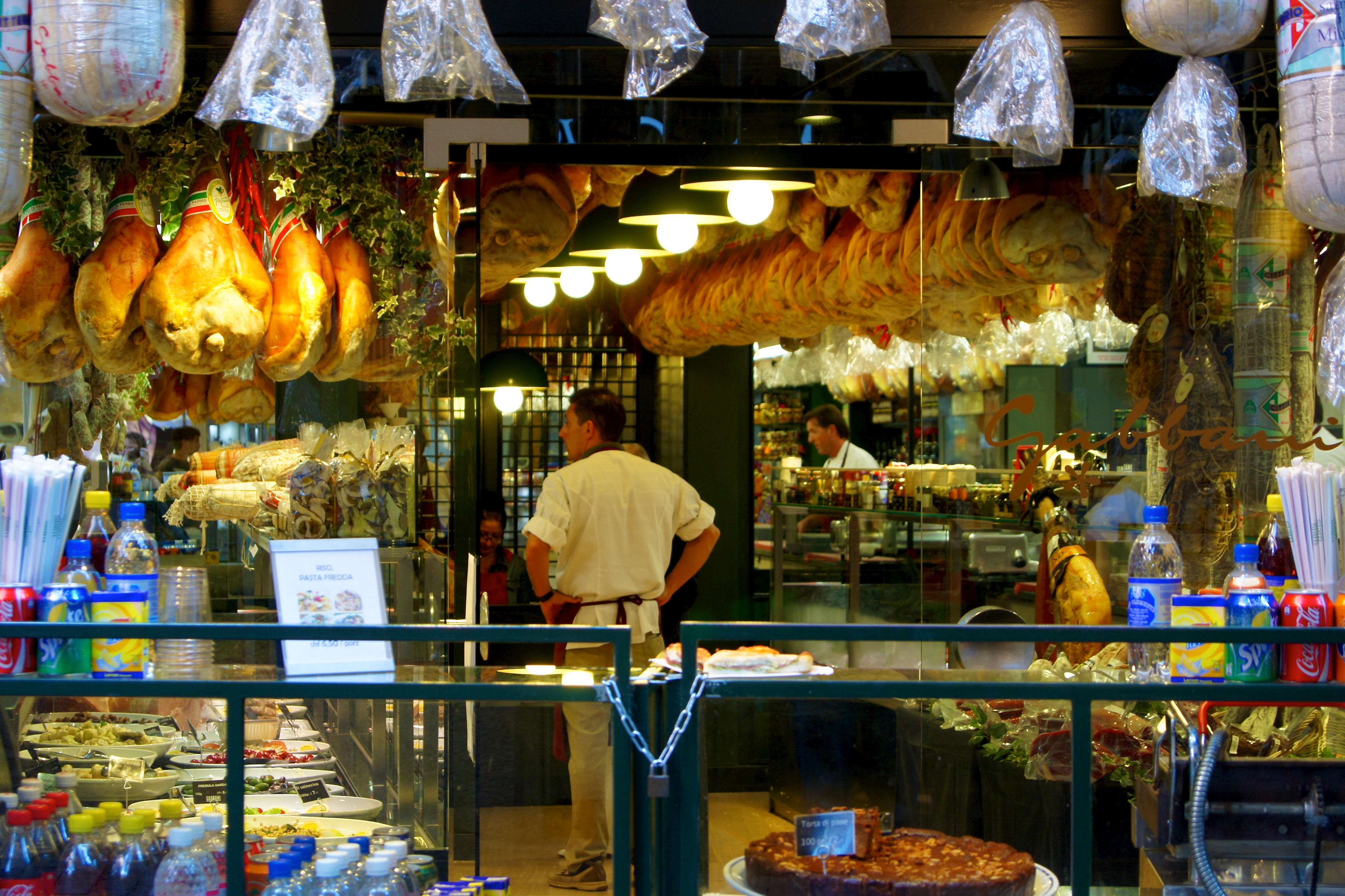 Salumeria Gabbani (2)